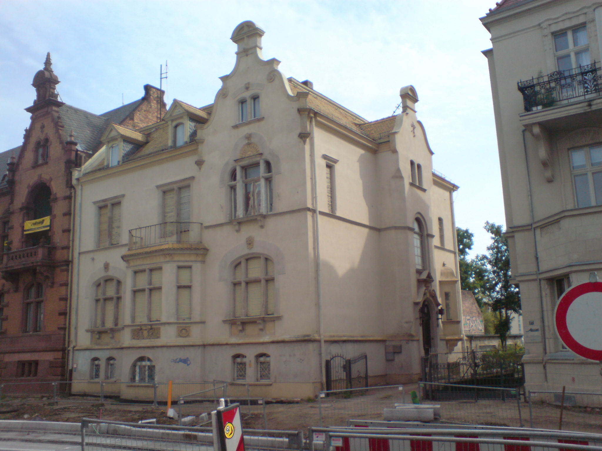 satzungsgeschütztes Mietwohnhaus Bahnhofstraße 25 in Cottbus